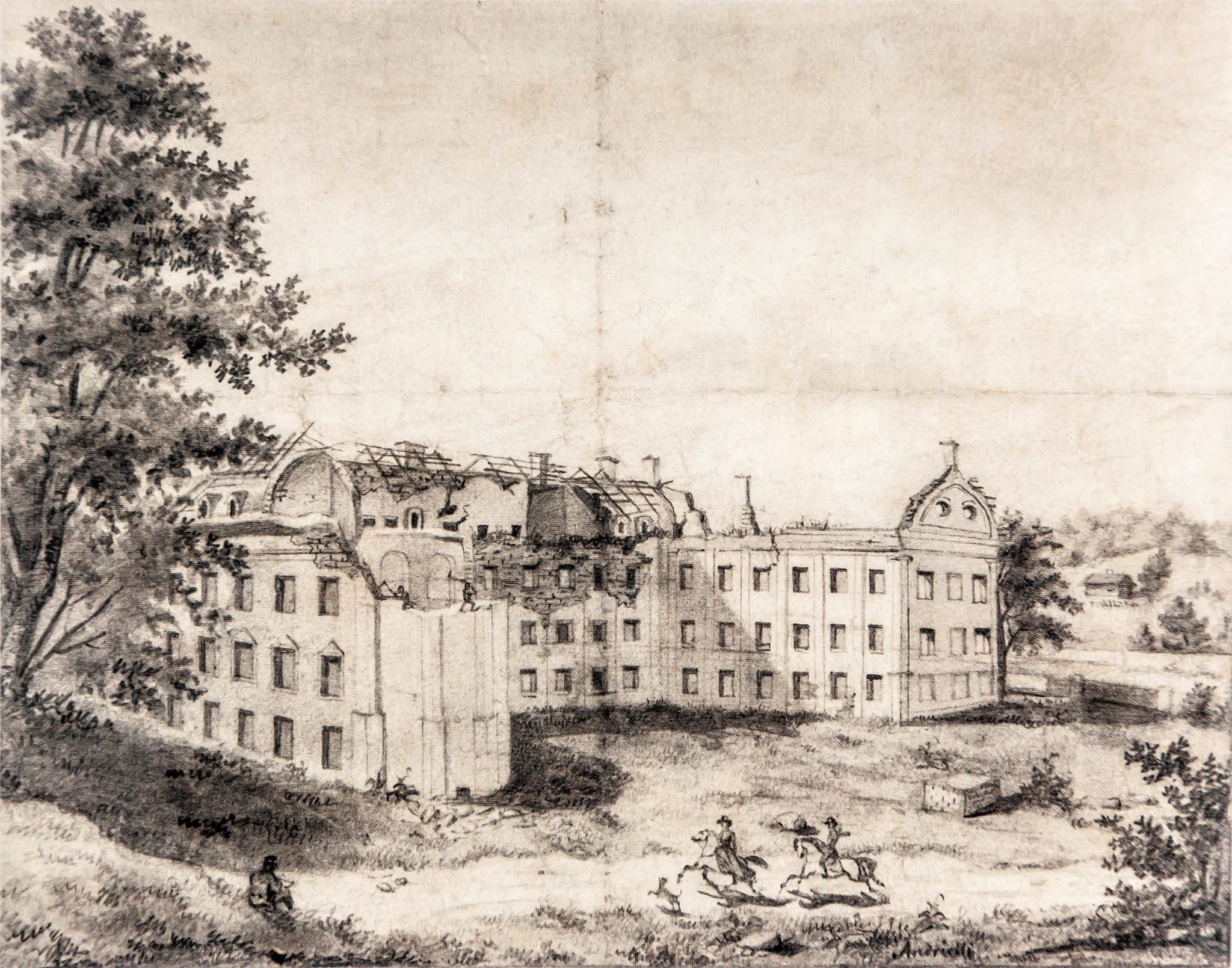 Беларуская (тарашкевіца): Вільня (Vilnia), Закрэт (Zakret)